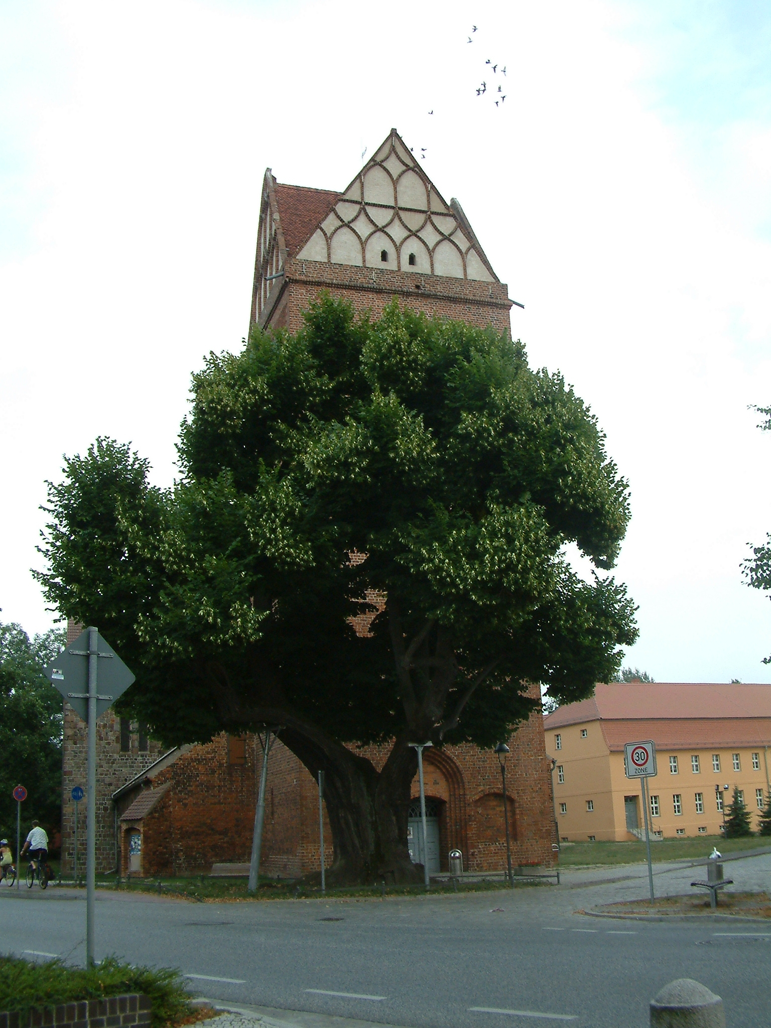 St.Marien Westansicht (2003) mit sogenannter Luther-Linde